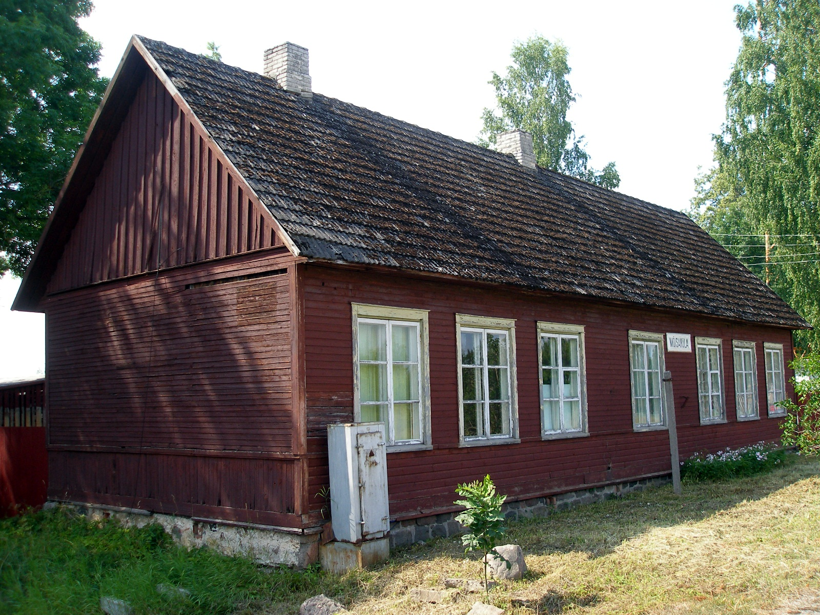 Meizakilas stacijas ēka